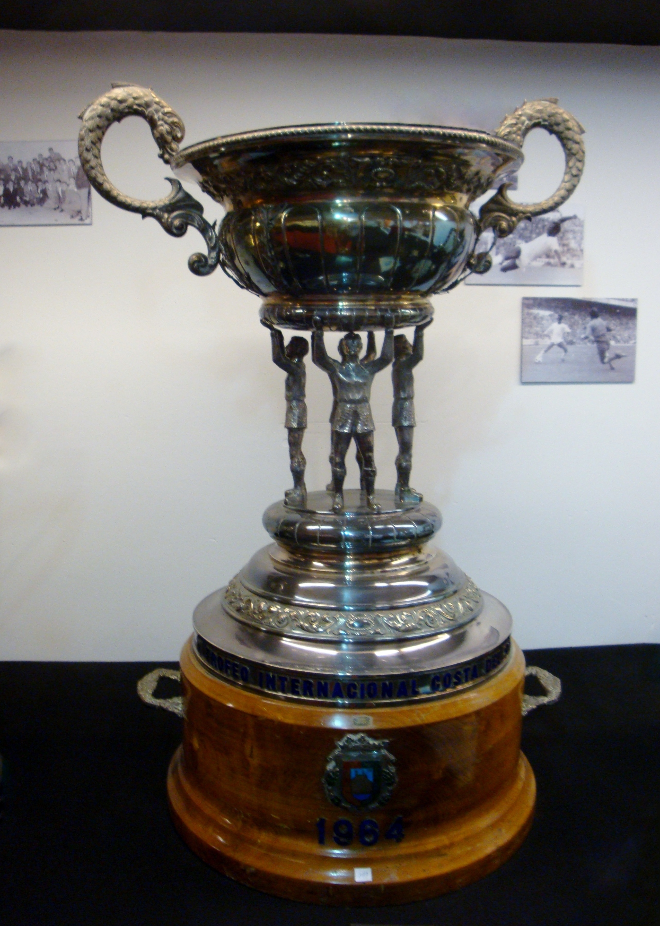 Trofeo Costa del Sol (1964) expuesto en el salón de Trofeos del Sevilla FC